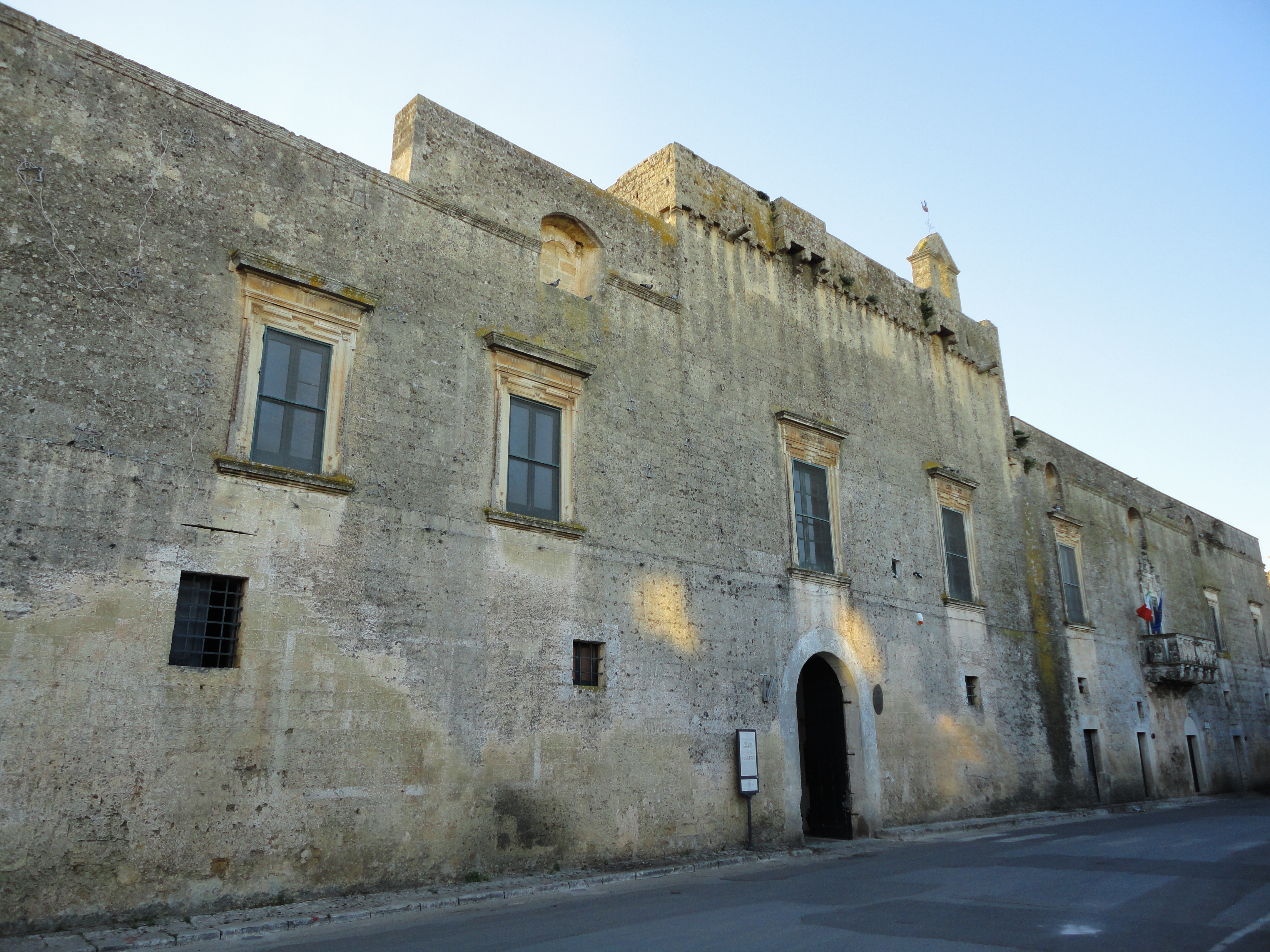 Palazzo Baronale Serafini Tiggiano, Lecce